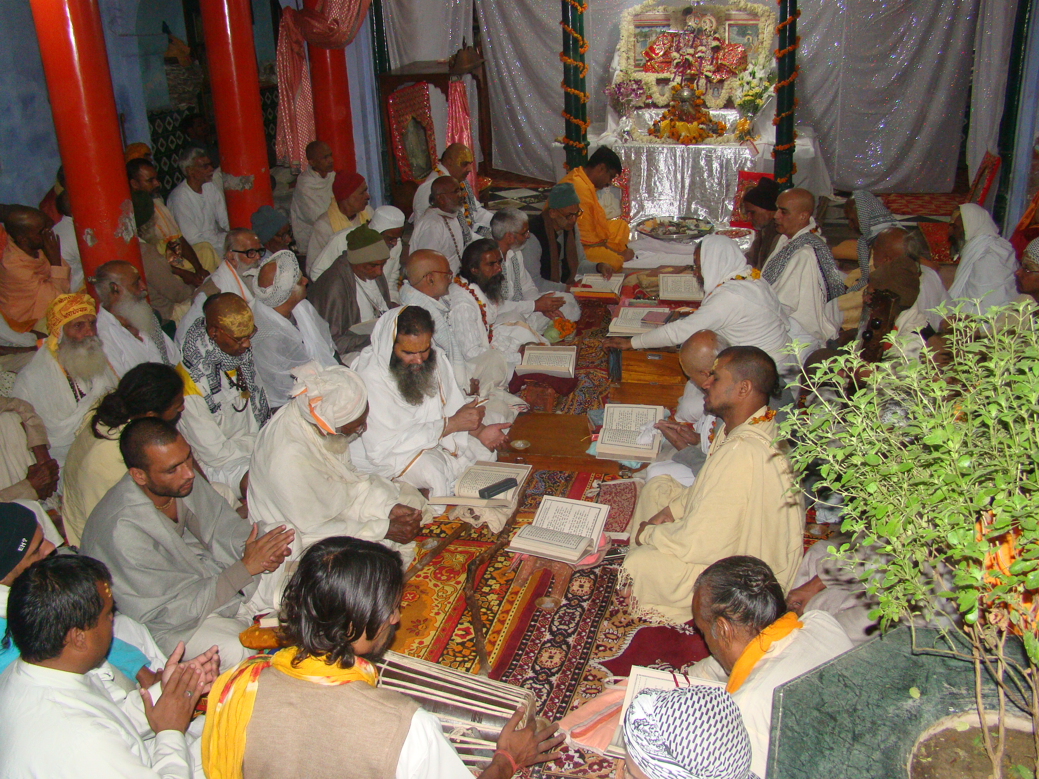 समाज गायन